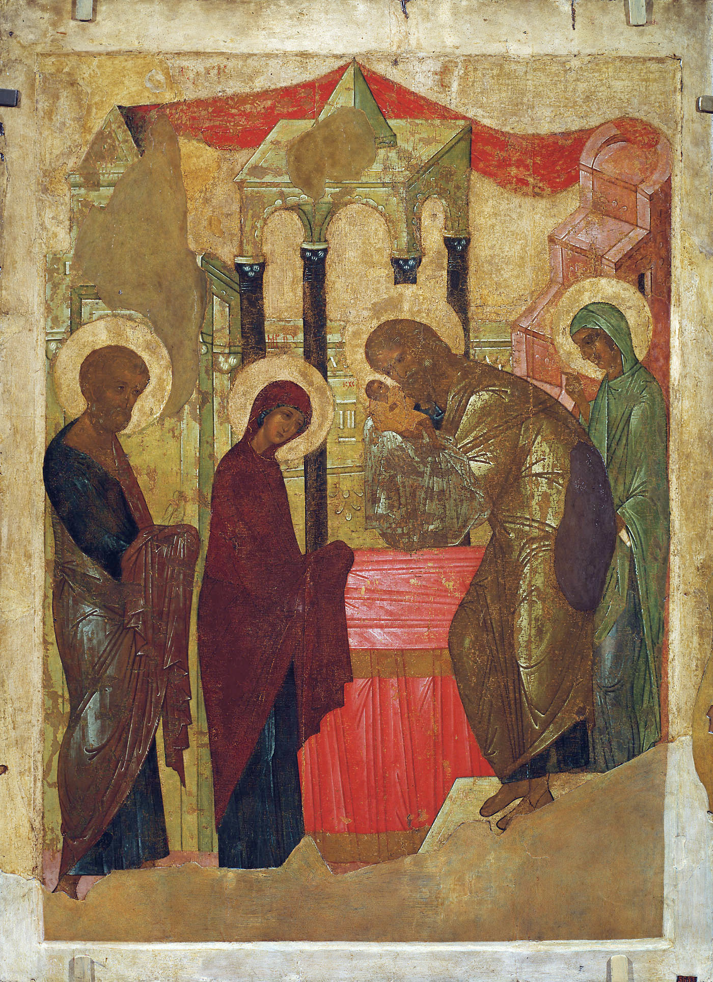 Сретение. Икона. Начало 15 в. Государственный Русский музей, Санкт-Петербург. Инв. 2135 Происходит из праздничного чина Успенского собора во Владимире Из праздничного ряда иконостаса Успенского собора. Сохранность посредственная. Много утрат с вставками нового левкаса (над головой Иосифа, на кивории, на одеянии Симеона и в нижней части доски). От золота фона и нимбов почти ничего не осталось. Сильно смыты верхние слои живописи (особенно на лице Иосифа). Несколько жесткая композиция, лишенная дивного рублевского ритма, указывает на руку не самого мастера, а его ученика.